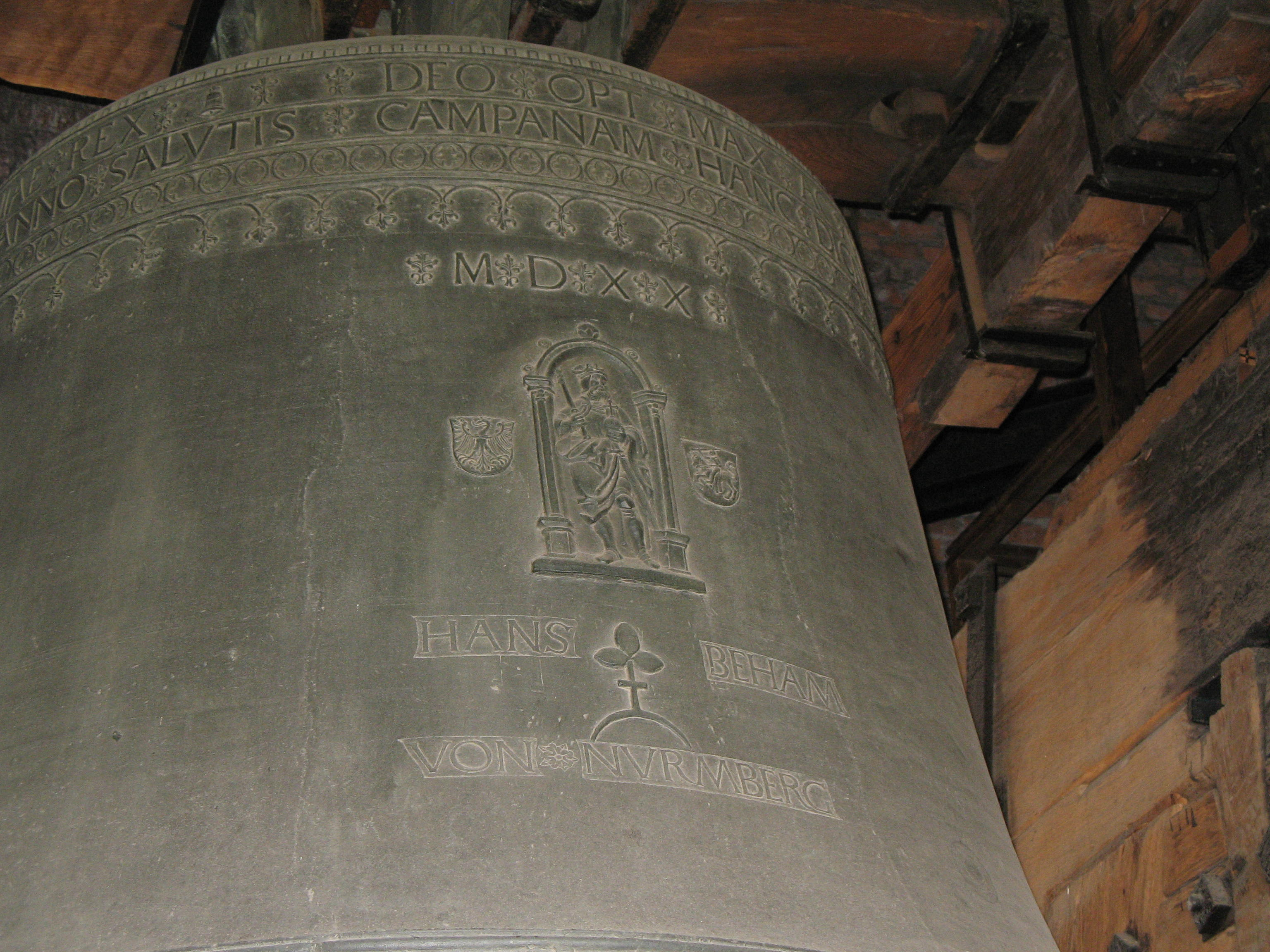 Wawel in Kraków, Poland